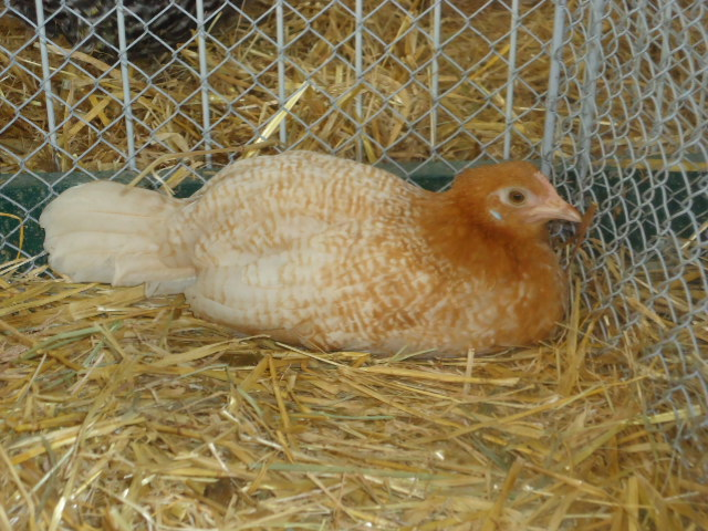 Jeune poulette braekel chamois